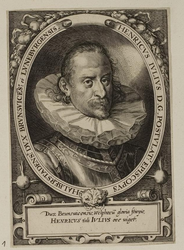 Grafik aus dem Klebeband Nr. 1 der Fürstlich Waldeckschen Hofbibliothek Arolsen Motiv: Heinrich Julius von Braunschweig-Wolfenbüttel